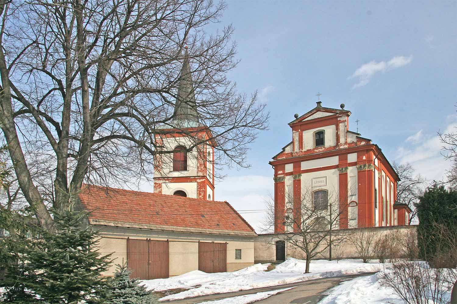 Poutní kostel Nanebevzetí Panny Marie v Hemži